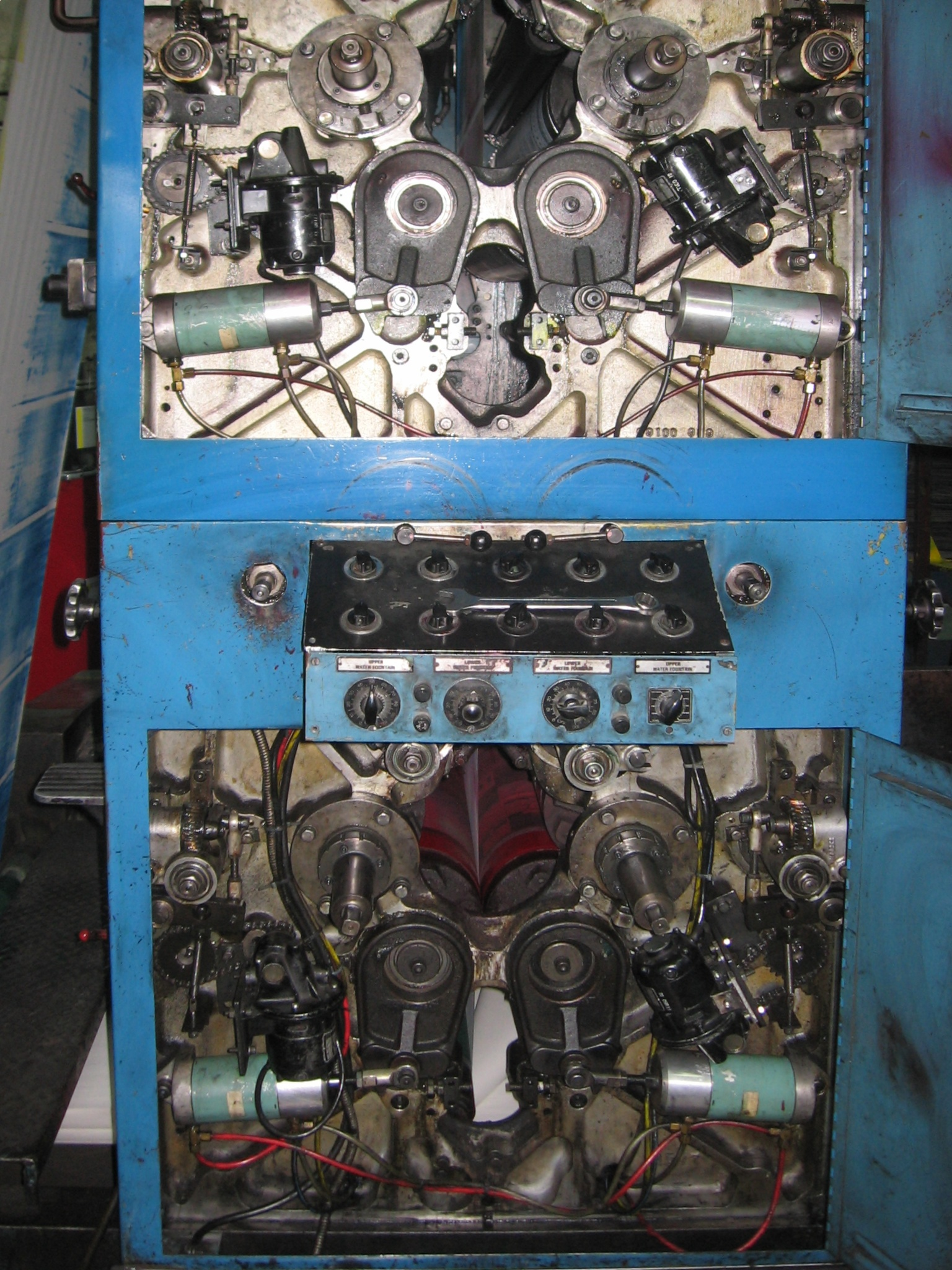 wieża drukująca małej rolowej maszyny offsetowej